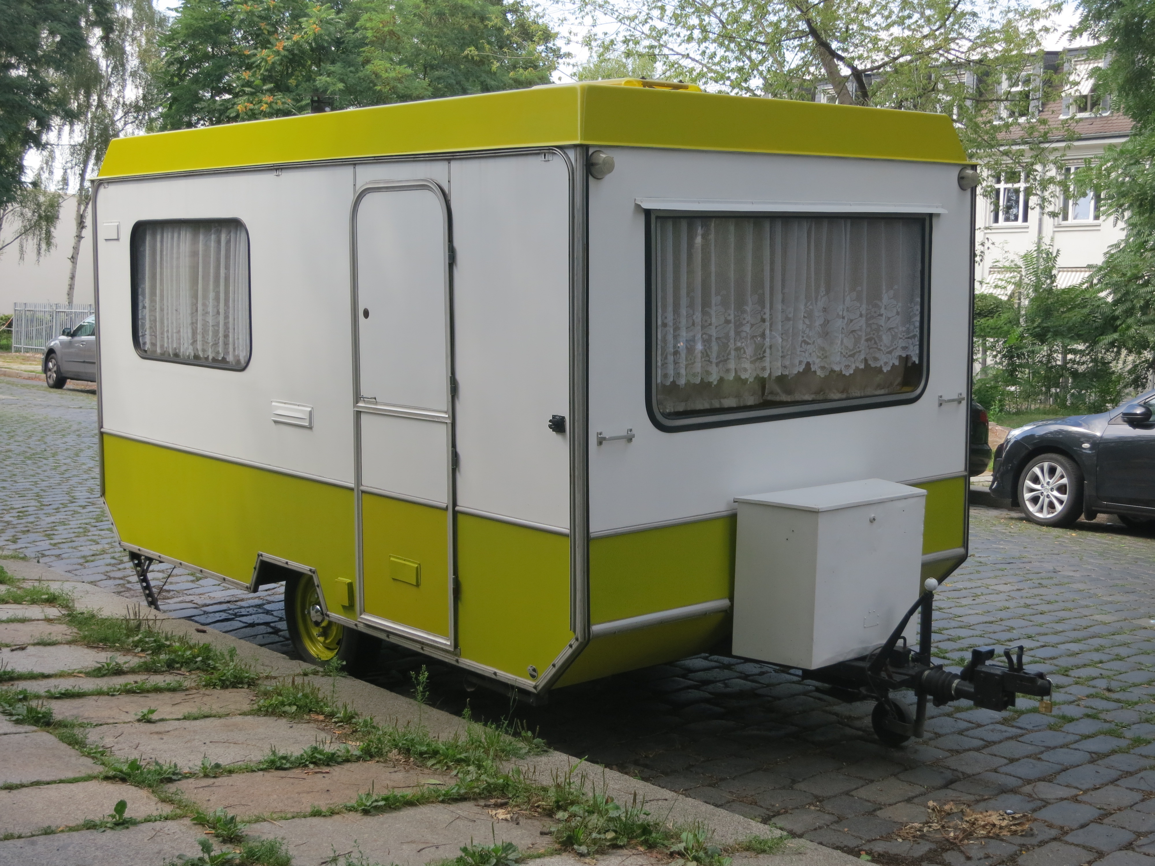 Bastei-Wohnwagen Typ HP 701.83, Baujahr 1977